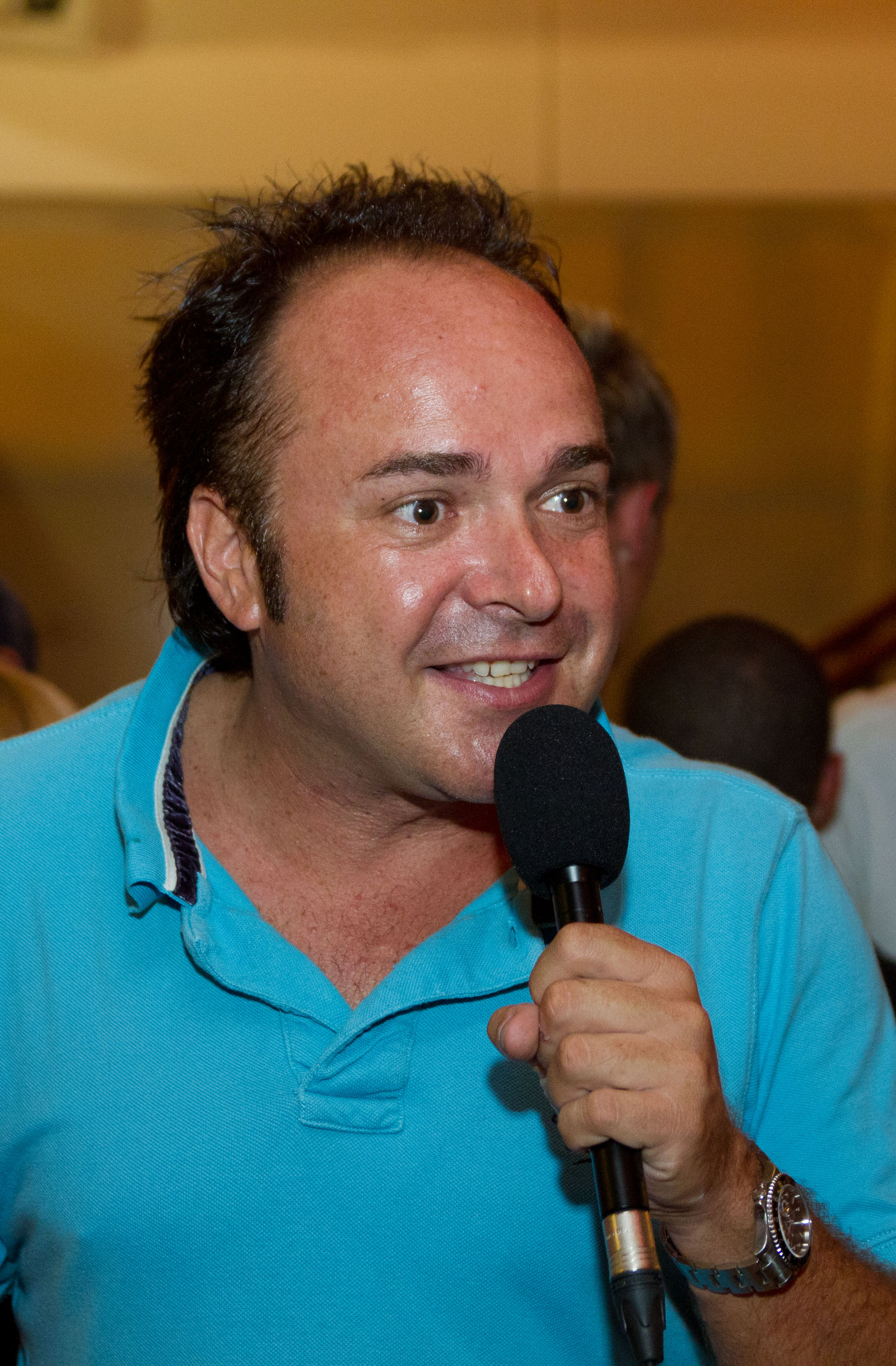 Tim Toupet als Gastreporter für MallorcaParty.tv im Bierkönig auf Mallorca